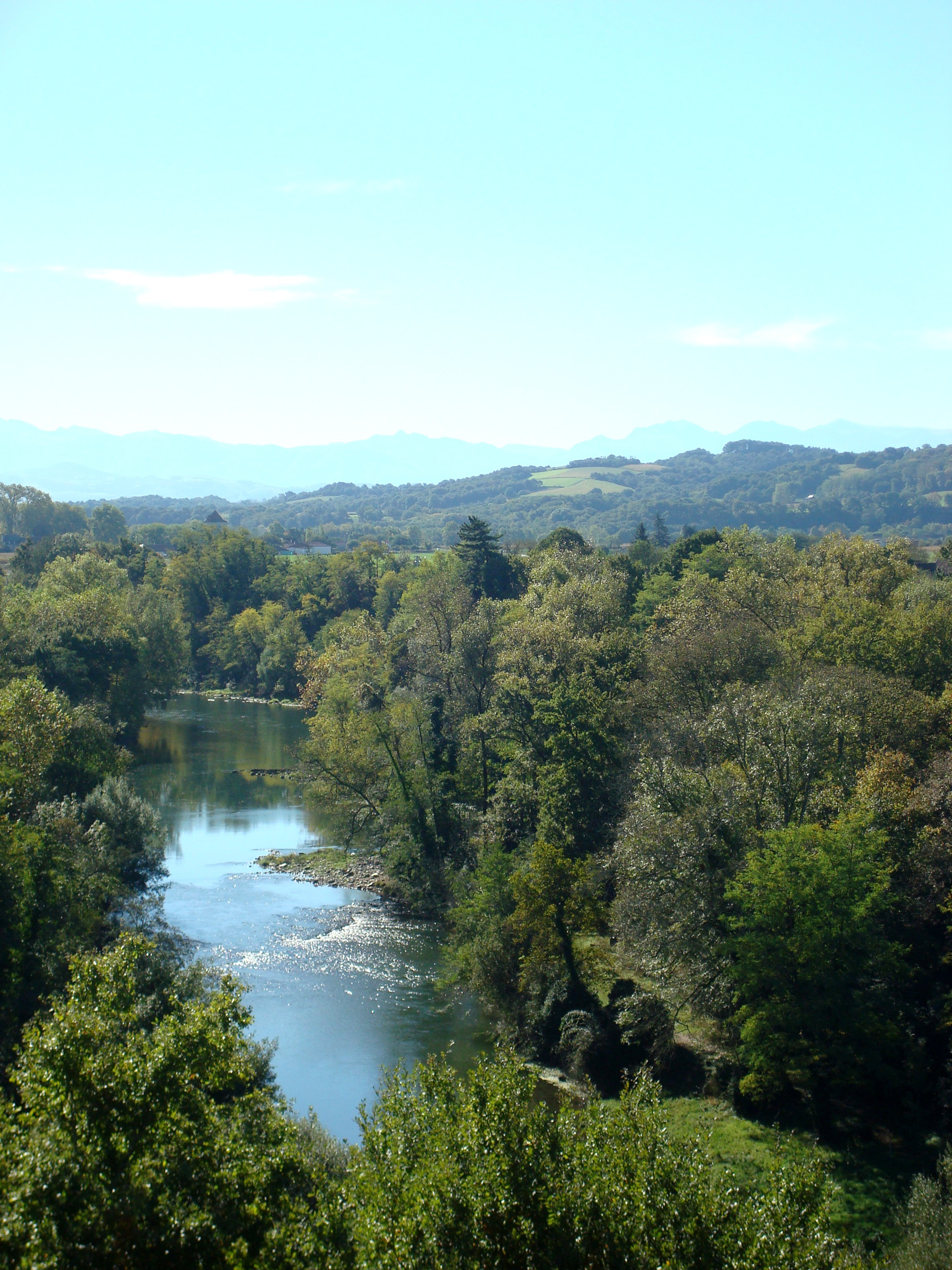 Vue depuis l'esplanade de l'Eglise Saint-André sur le gave d'Oloron, Sauveterre-de-Béarn